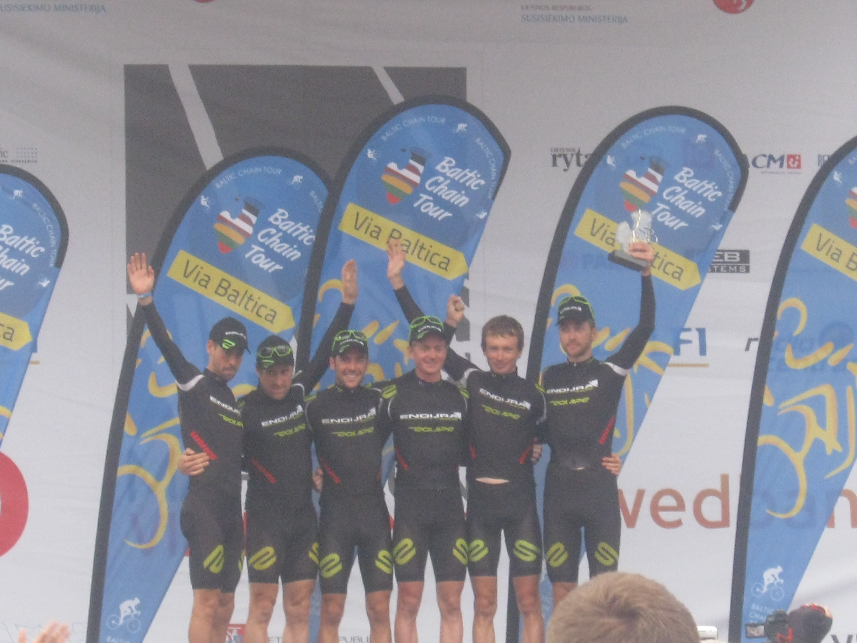 Baltic Chain Tour 2012, 5th Stage - Vilnius